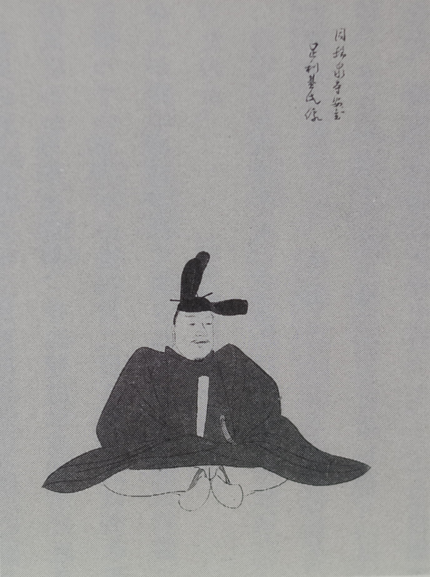 A portrait of Kantō Kubō Ashikaga Motouji